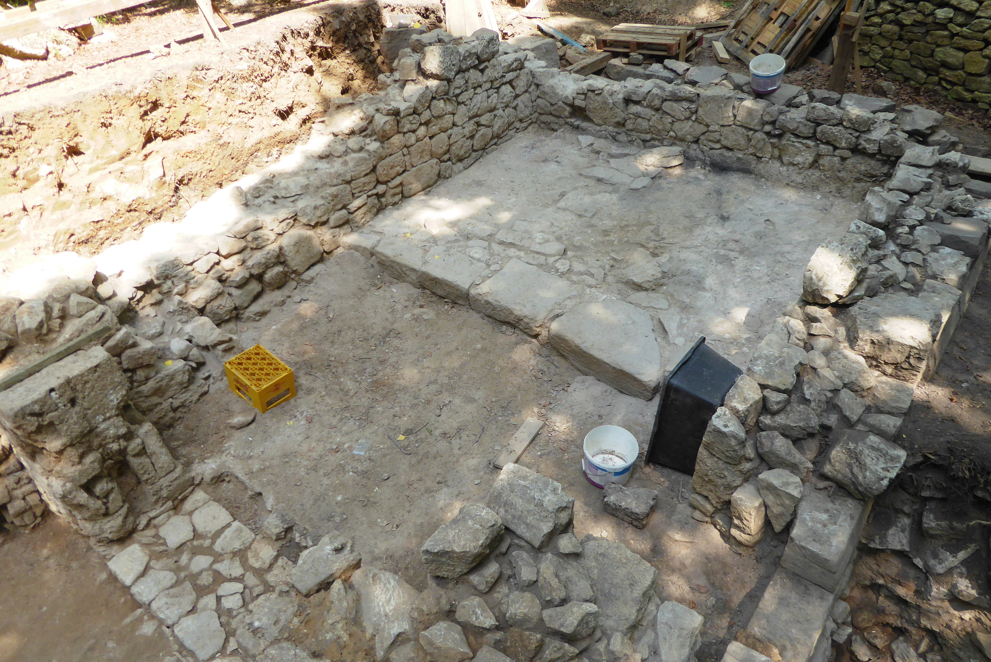 Archäologische Grabung an einer Kirchenruine nahe Asche, Stadt Hardegsen, Südniedersachsen. Blick von Südwesten auf den ehemaligen Chorraum, vorn (unten) rechts die Priesterpforte